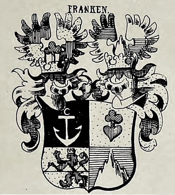 Wappen der rheinländisch-kurpfälzischen Adelsfamilie von Francken bzw. von Franken